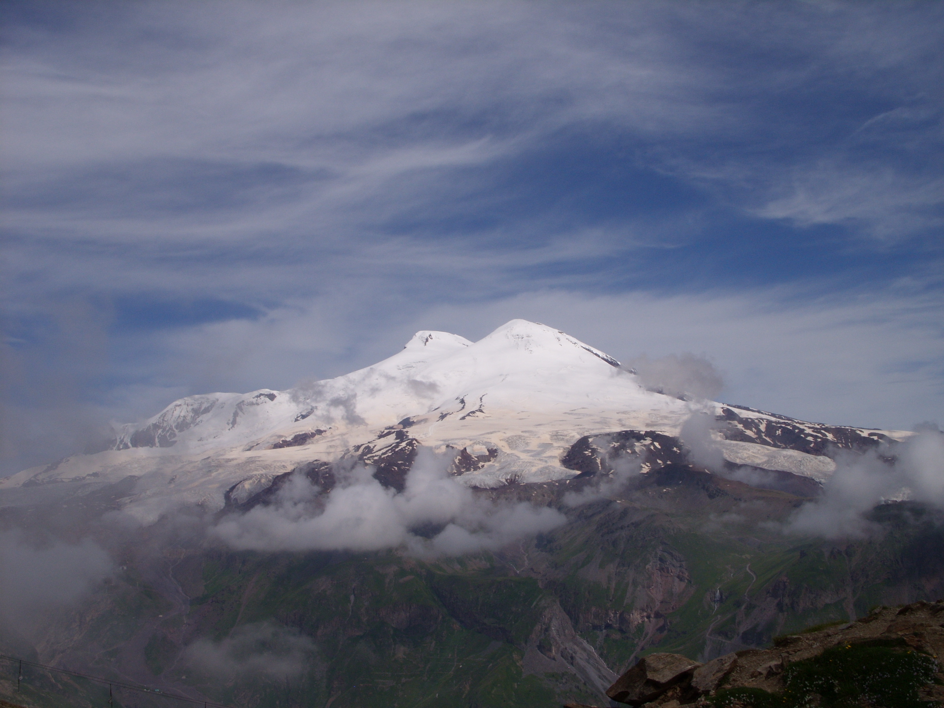 Сняты с горы Чегет. Снимки сделаны во время автобусной экскурсии из Железноводска, июль 2009 г.